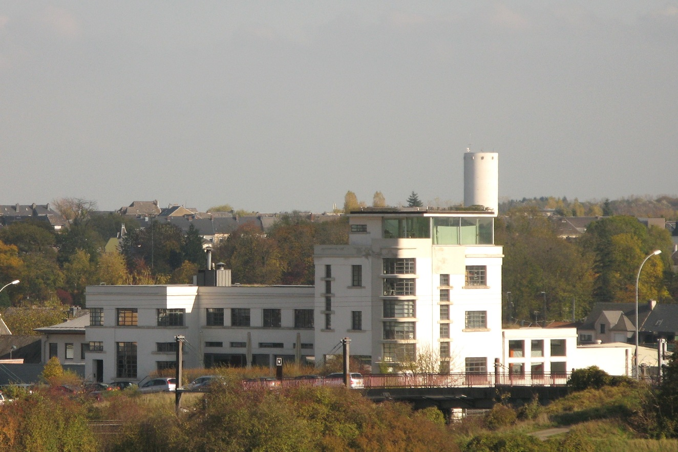 Déi fréier Molkerei vu Beetebuerg. Kategorie:Molkereien zu Lëtzebuerg